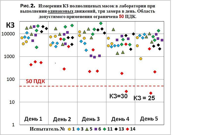 Непостоянство коэффициентов защиты при выполнении одинаковых движений в лаборатории